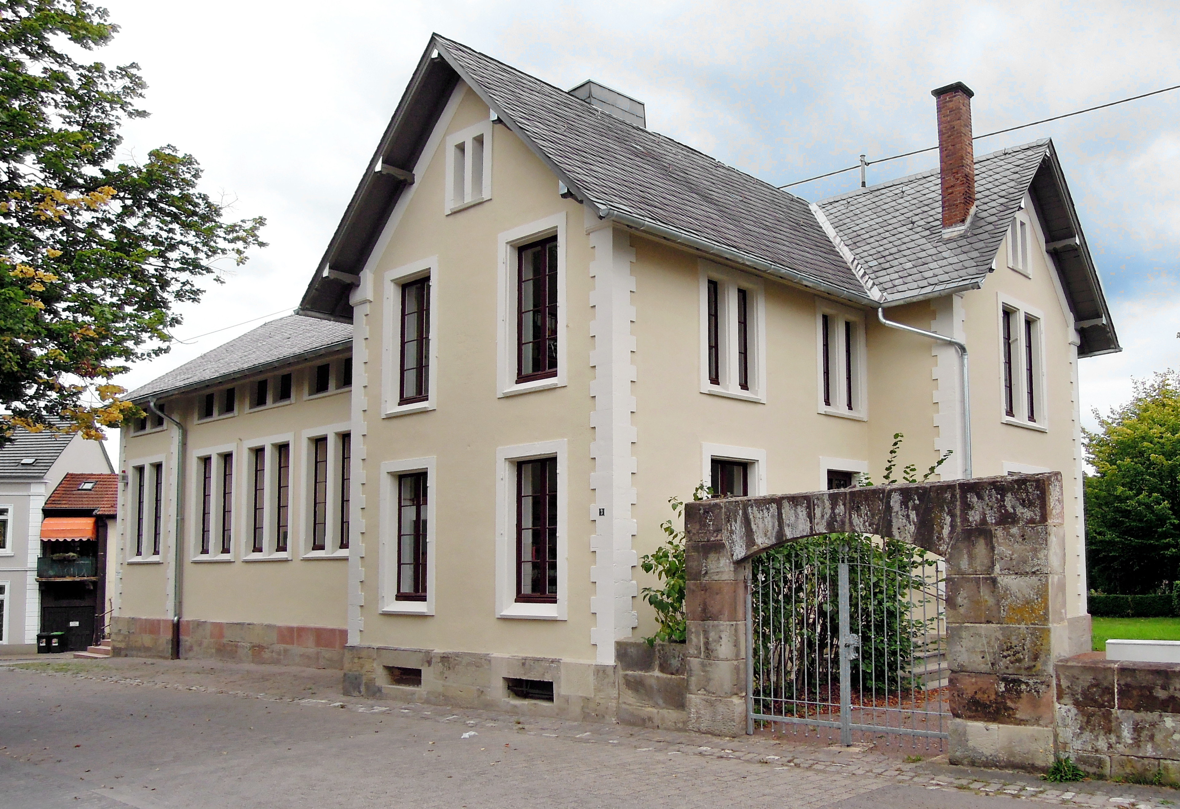 Louisenstraße 3, ehem. Rathaus, 1874 (Einzeldenkmal), beheimatet heute das Historische Museum Wallerfangen